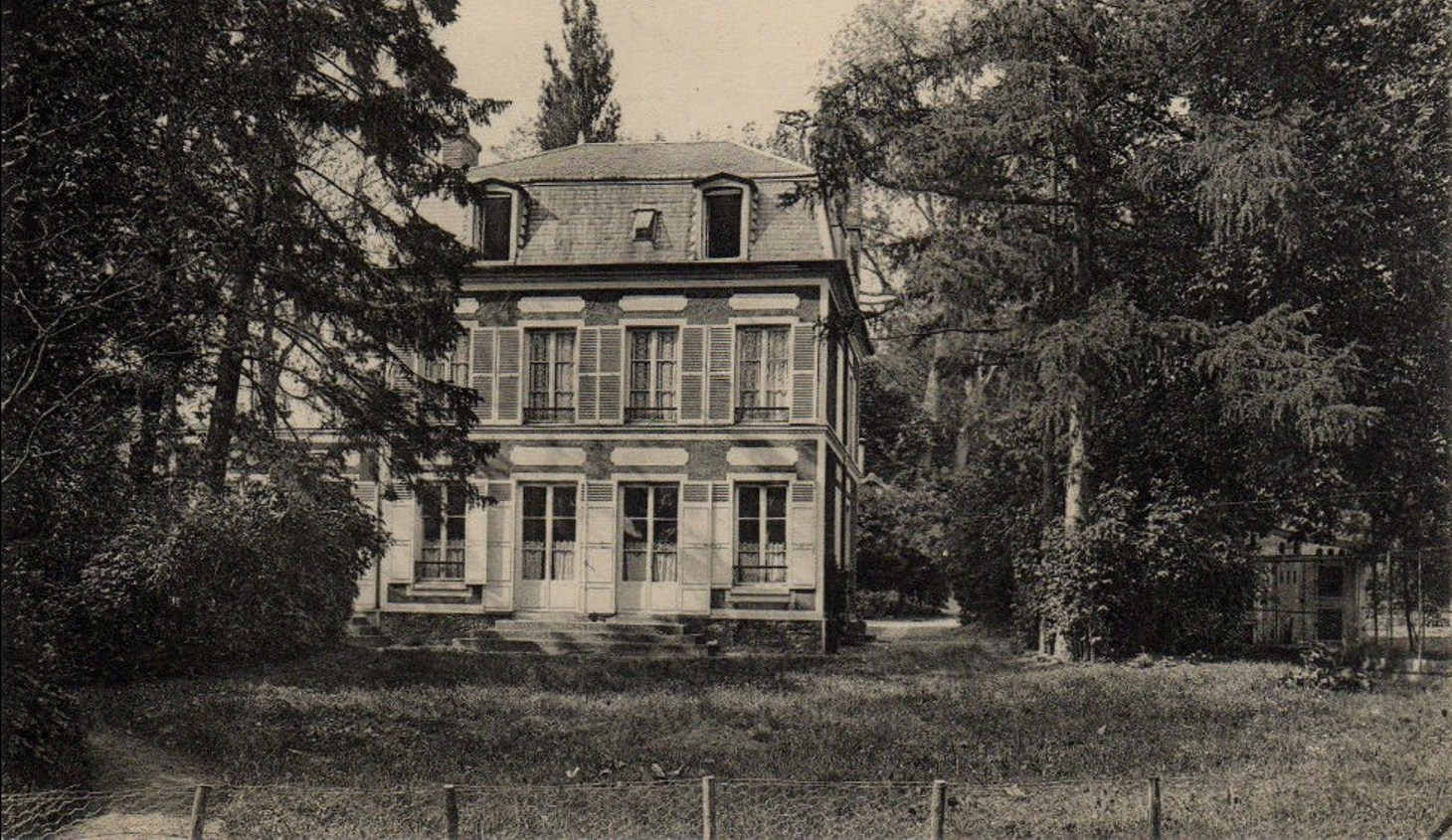 Maison de la romancière George Sand et du graveur Alexandre Manceau à Palaiseau. George Sand s'installe dans la propriété en 1864 et la vend en 1869.